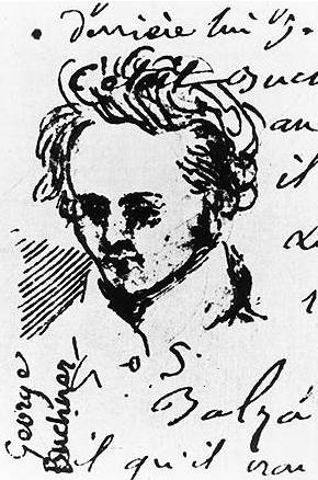 Alexis Muston aus Straßburg fertigte diese Skizze seines Freundes Georg Büchner etwa 1835